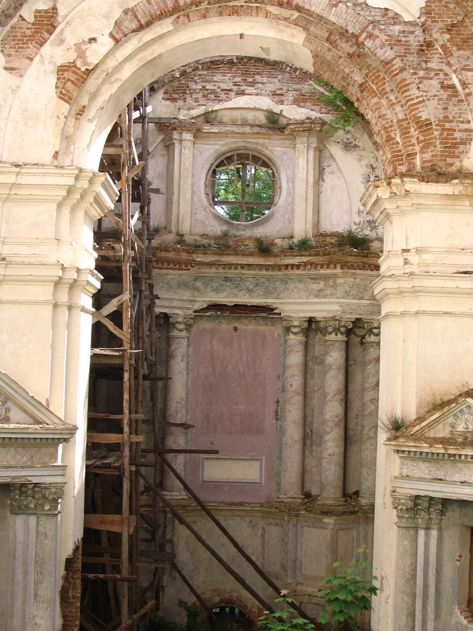 Беларуская (тарашкевіца): Касьцёл Найсьвяцейшай Тройцы (Лыскава). Алтарная частка. This is a photo of Belarusian heritage monument. Reference number: 112Г000621 ( WLM)